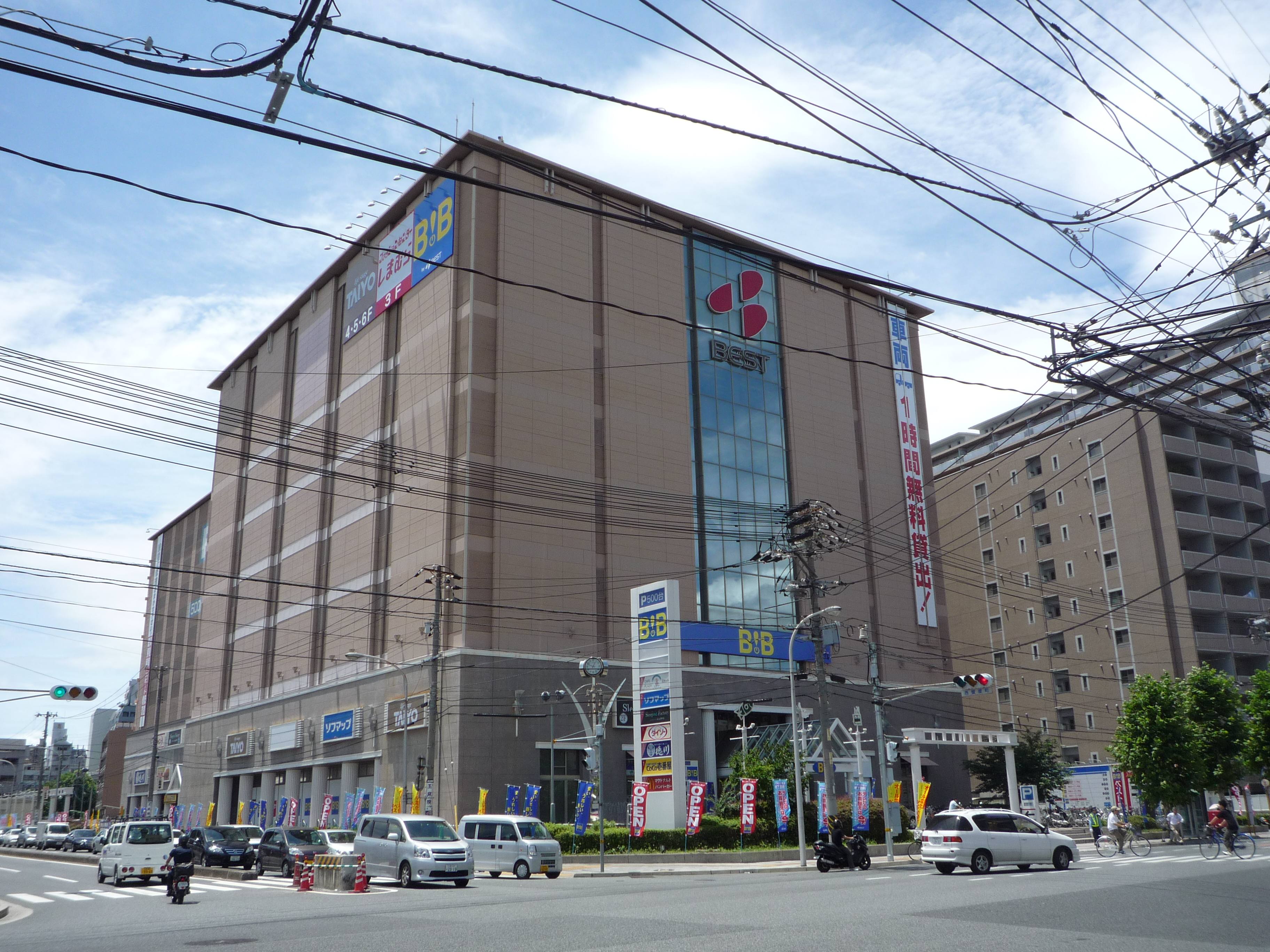 ベスト電器BB 広島店